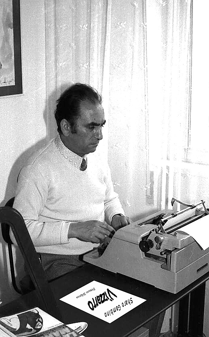 Sharo Gambino scrive l'opera " 'U Vizzarru"